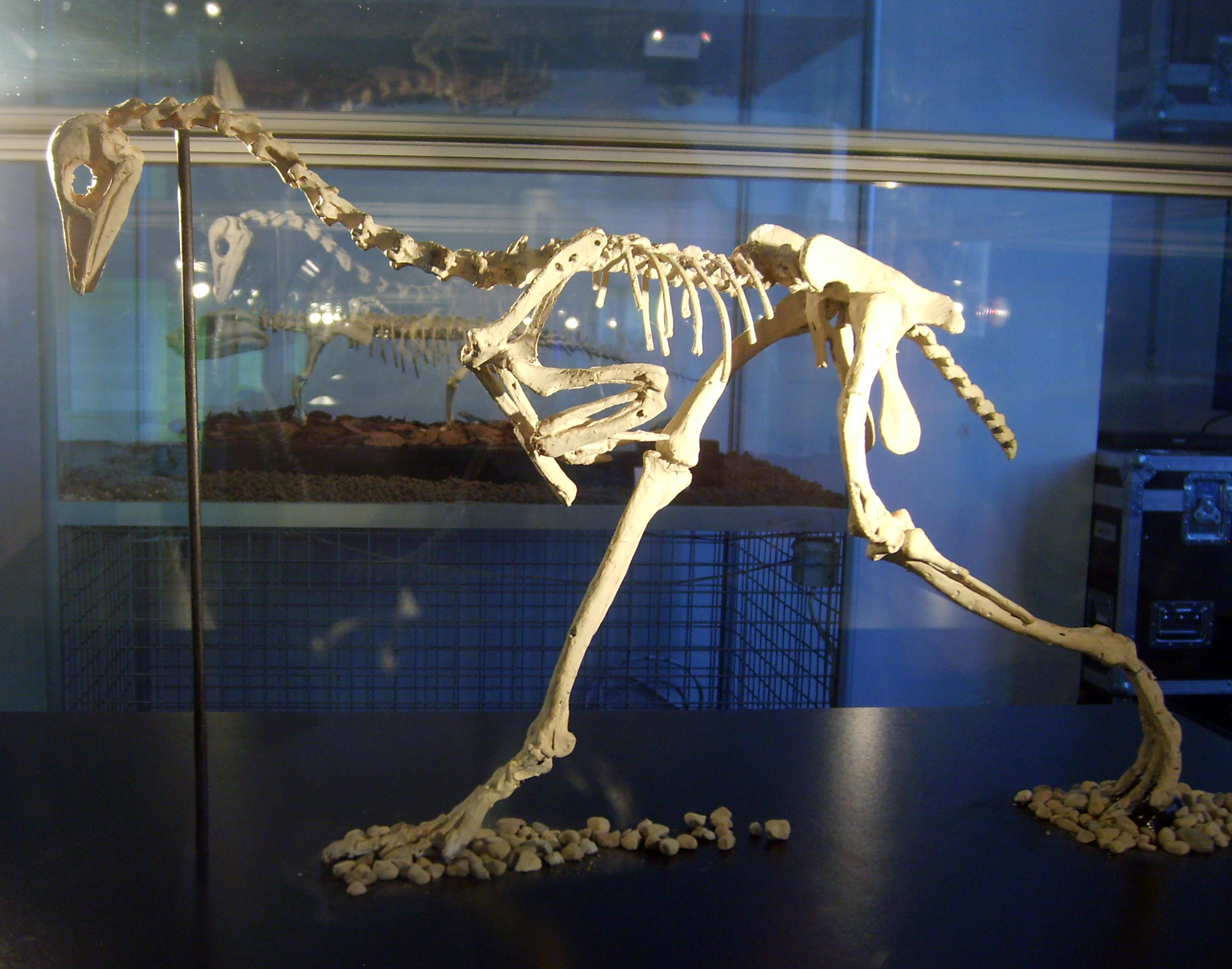 Patagopteryx skeleton restoration, Copenhagen.